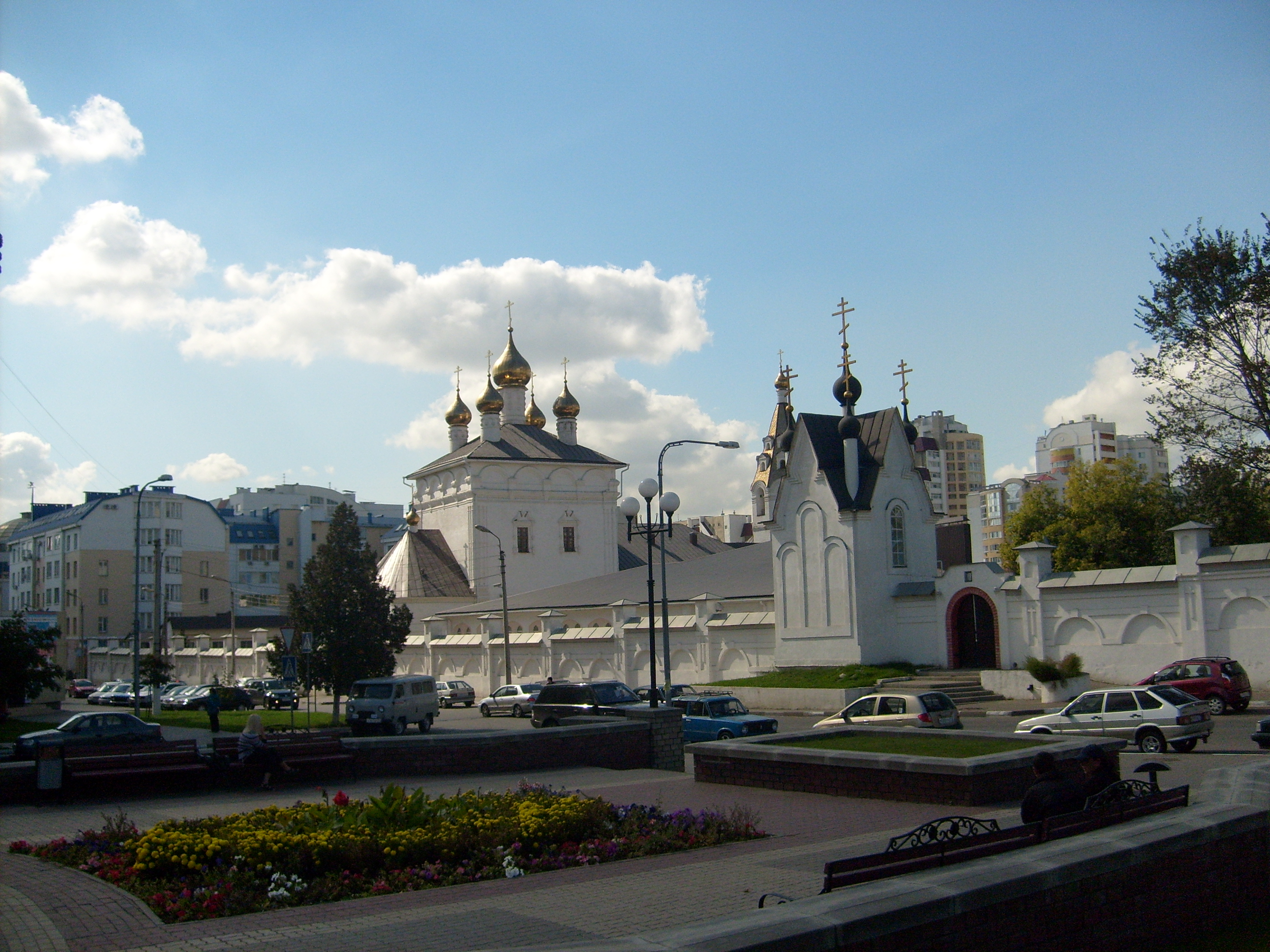 Марфо-Мариинский монастырь в Белгороде, ул.Пушкина 19. На первом плане часовня Царственных Новомучеников, за ней Успенский собор. В 1993 в Белгород, к восстанавливаемой Покровской церкви, была переведена часть сестер Марфо-Мариинской обители, организованной в 1990 по уставу московской Марфо-Мариинской обители в селе Зимовеньки. Статус монастыря община получила в 1999.